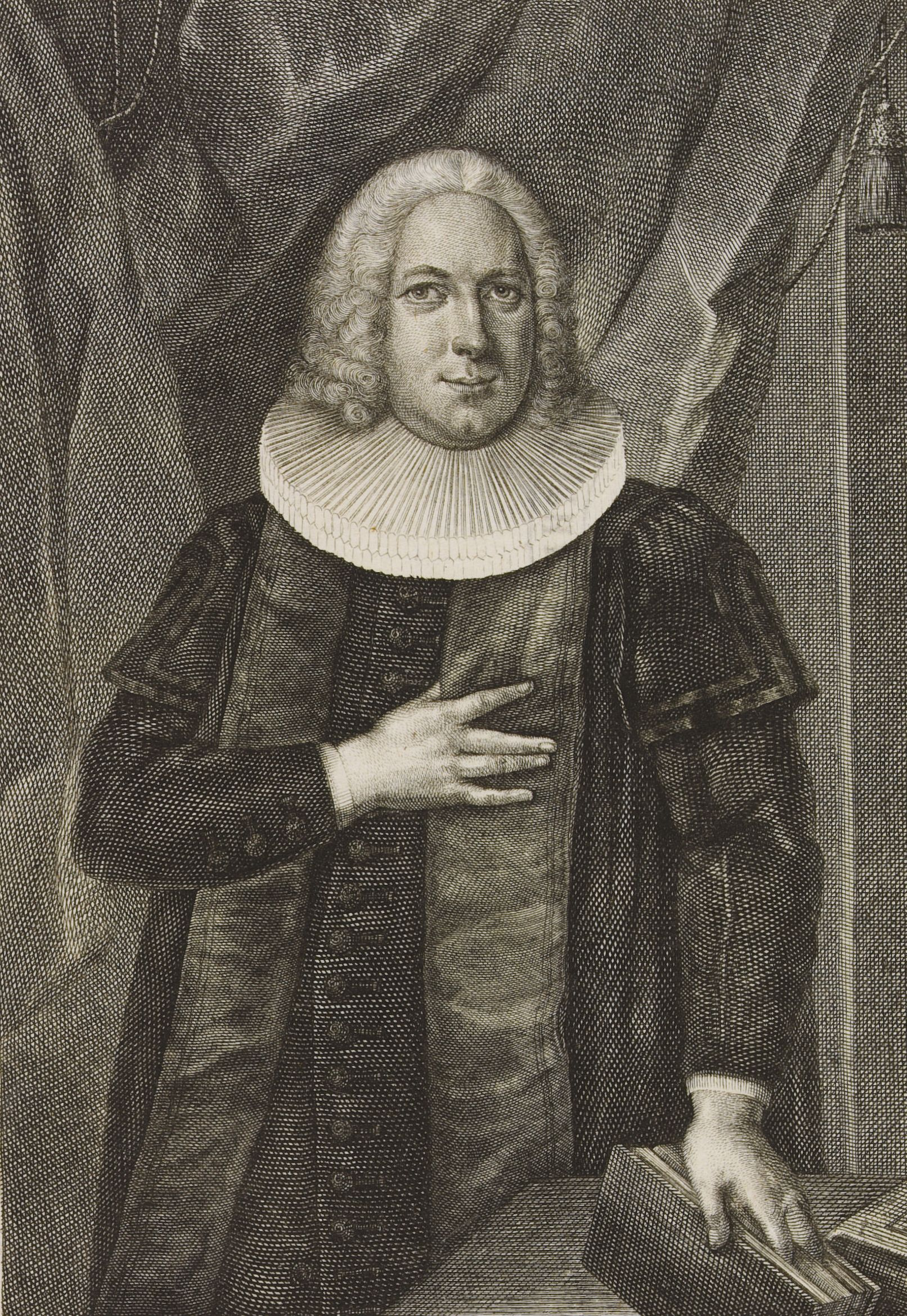 Bildnis von Ernst F. Mylius